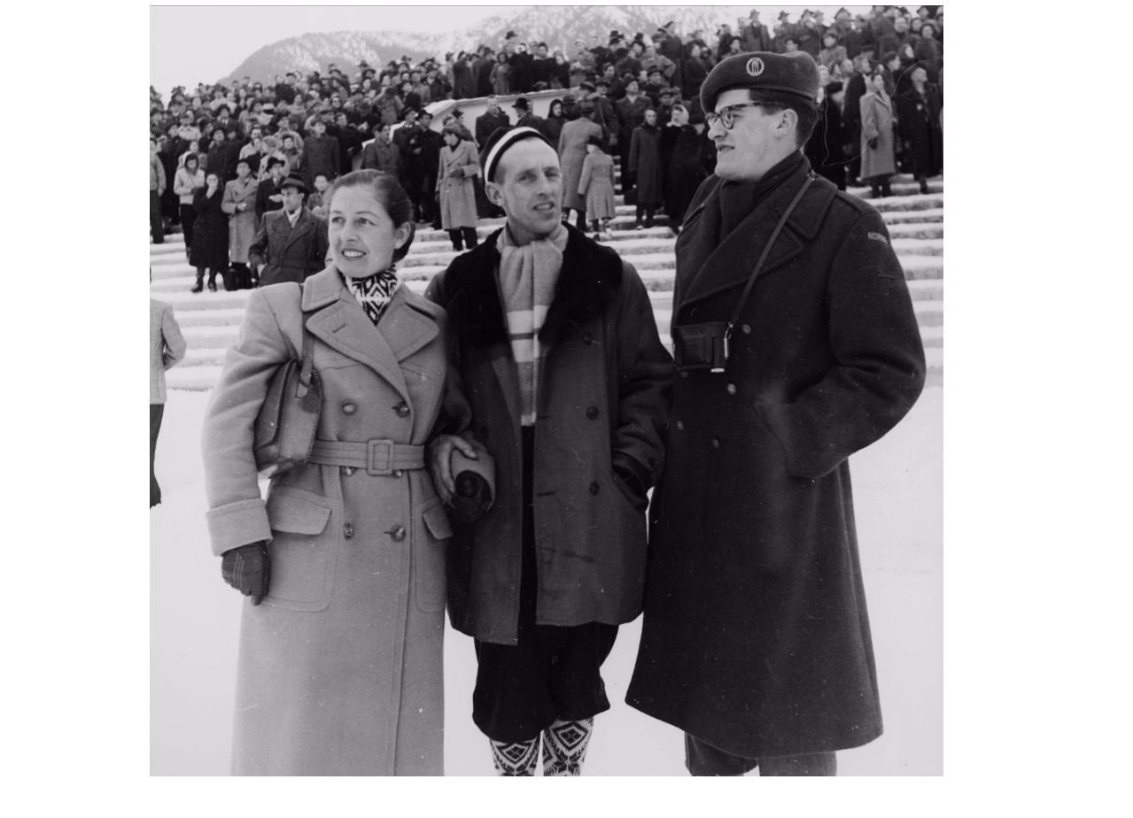 Eilert Dahl à Garmisch